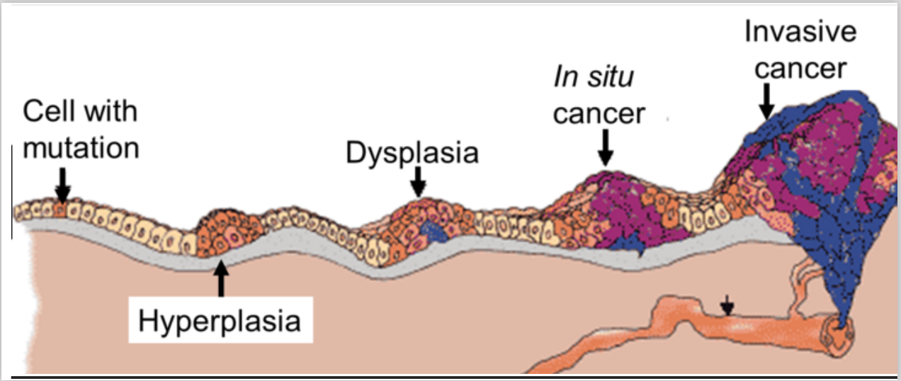 חיהיכ